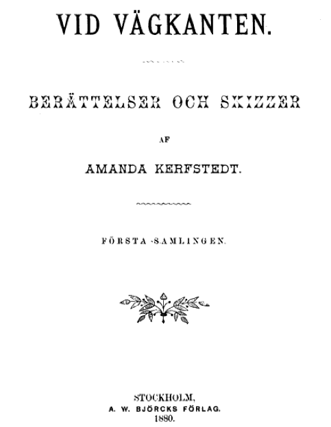 Försättsblad till första samlingen av Vid vägkanten